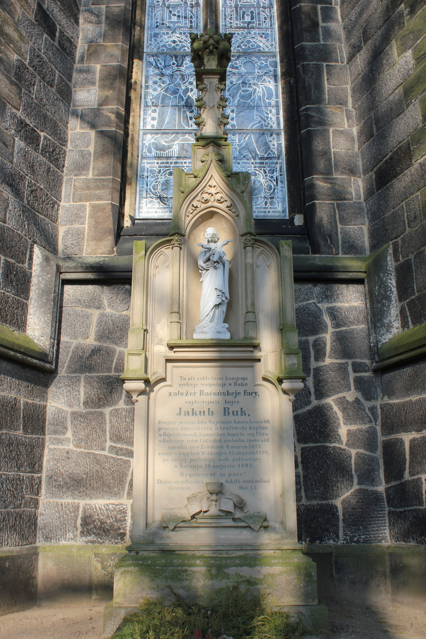 Hornjoserbsce: Na Baćońjanskim kěrchowje; row Jakuba Buka.